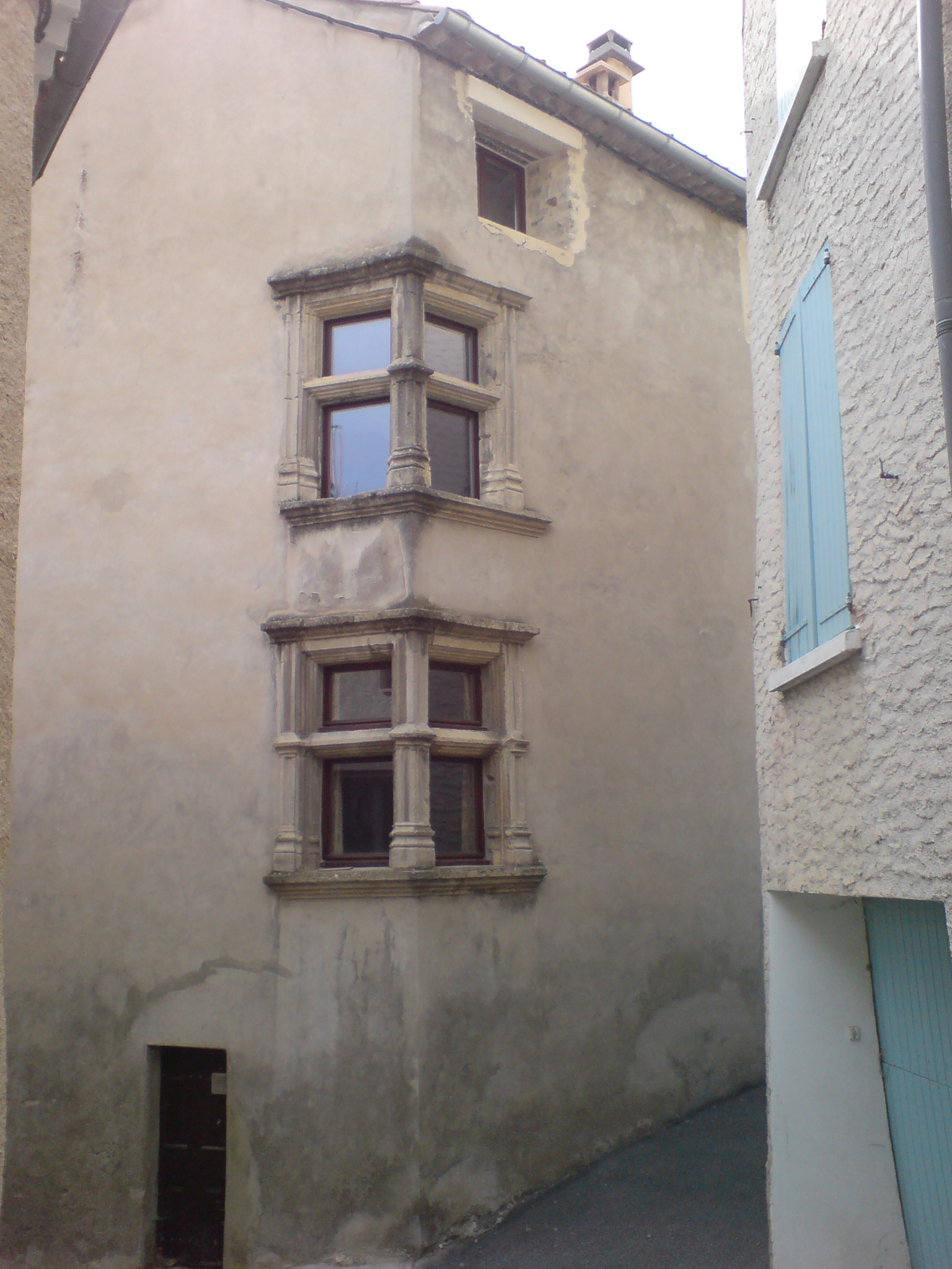 Fenêtre à croisée à l’angle d’un bâtiment, dans le village de Peyruis